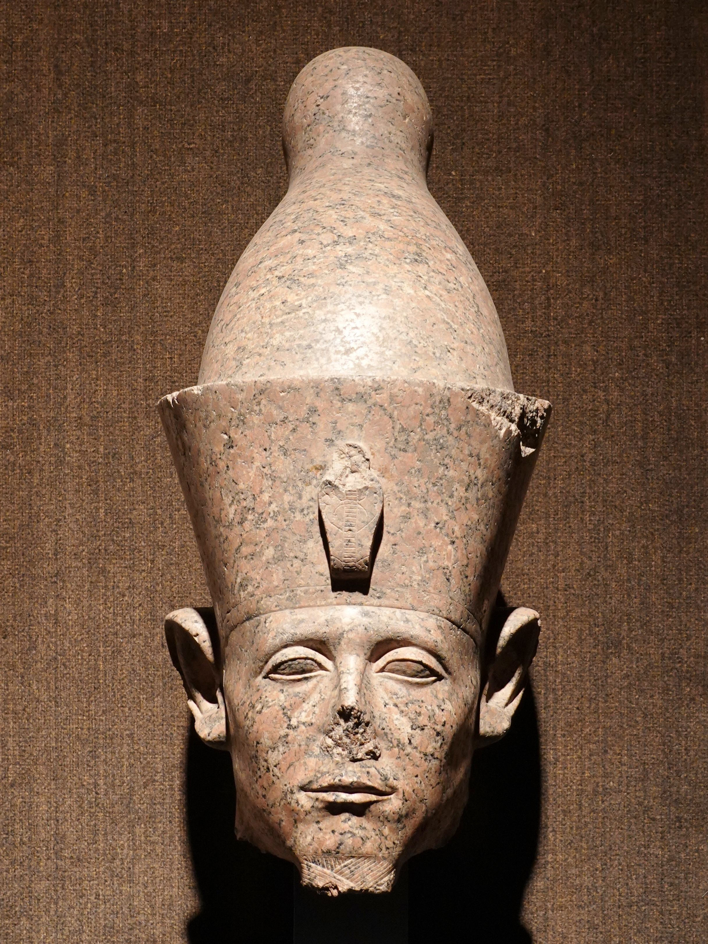 Kopf einer Statue des Königs Sesostris III. (Höhe: 80 cm, Rosengranit, 12. Dynastie), gefunden 1970 vor den 4. Pylon des Karnak-Tempels, ausgestellt im Luxor-Museum, Ägypten